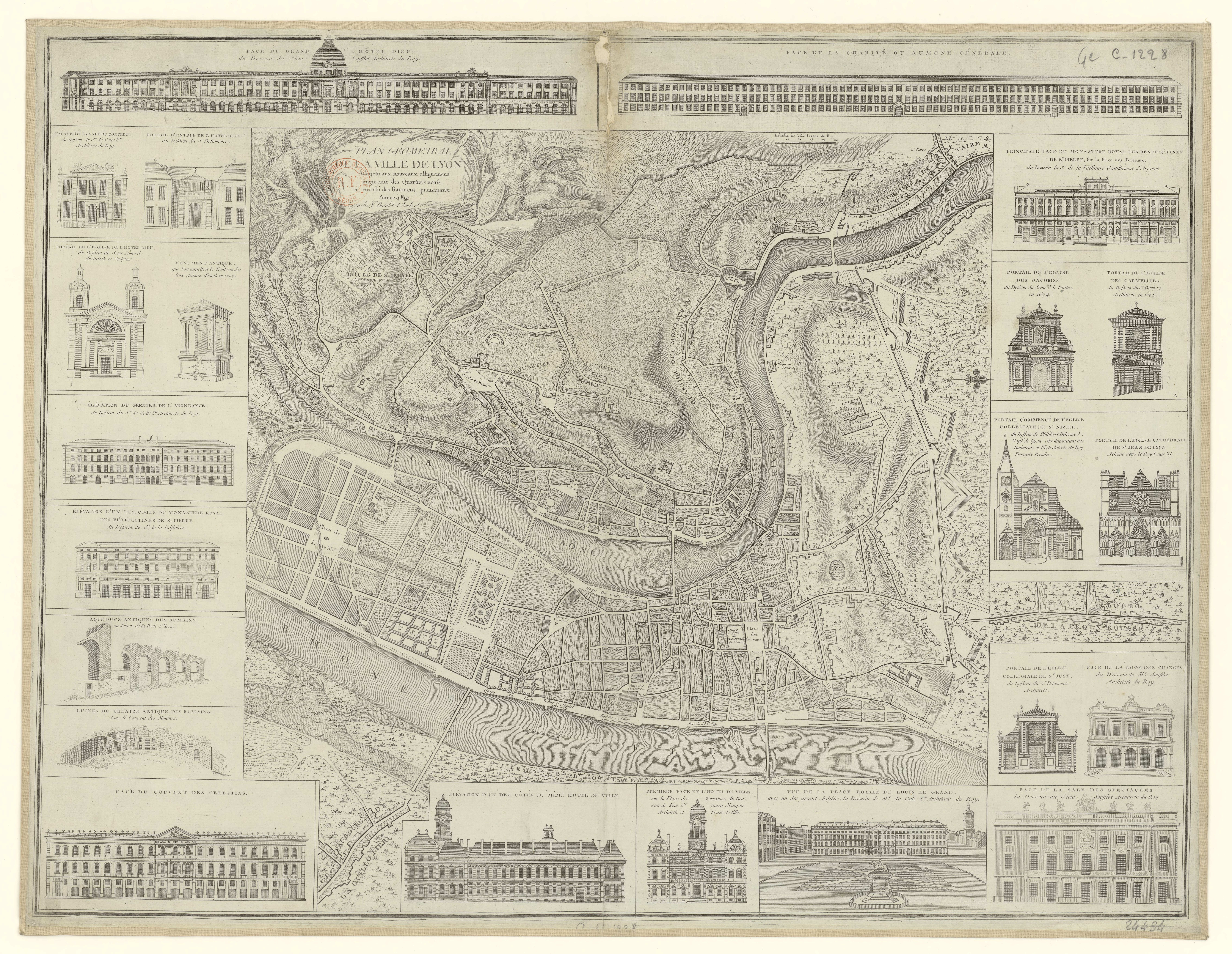 Plan géométral de la ville de Lyon, assujetti aux nouveaux alignements, augmenté des quartiers neufs et enrichi des bâtiments principaux.